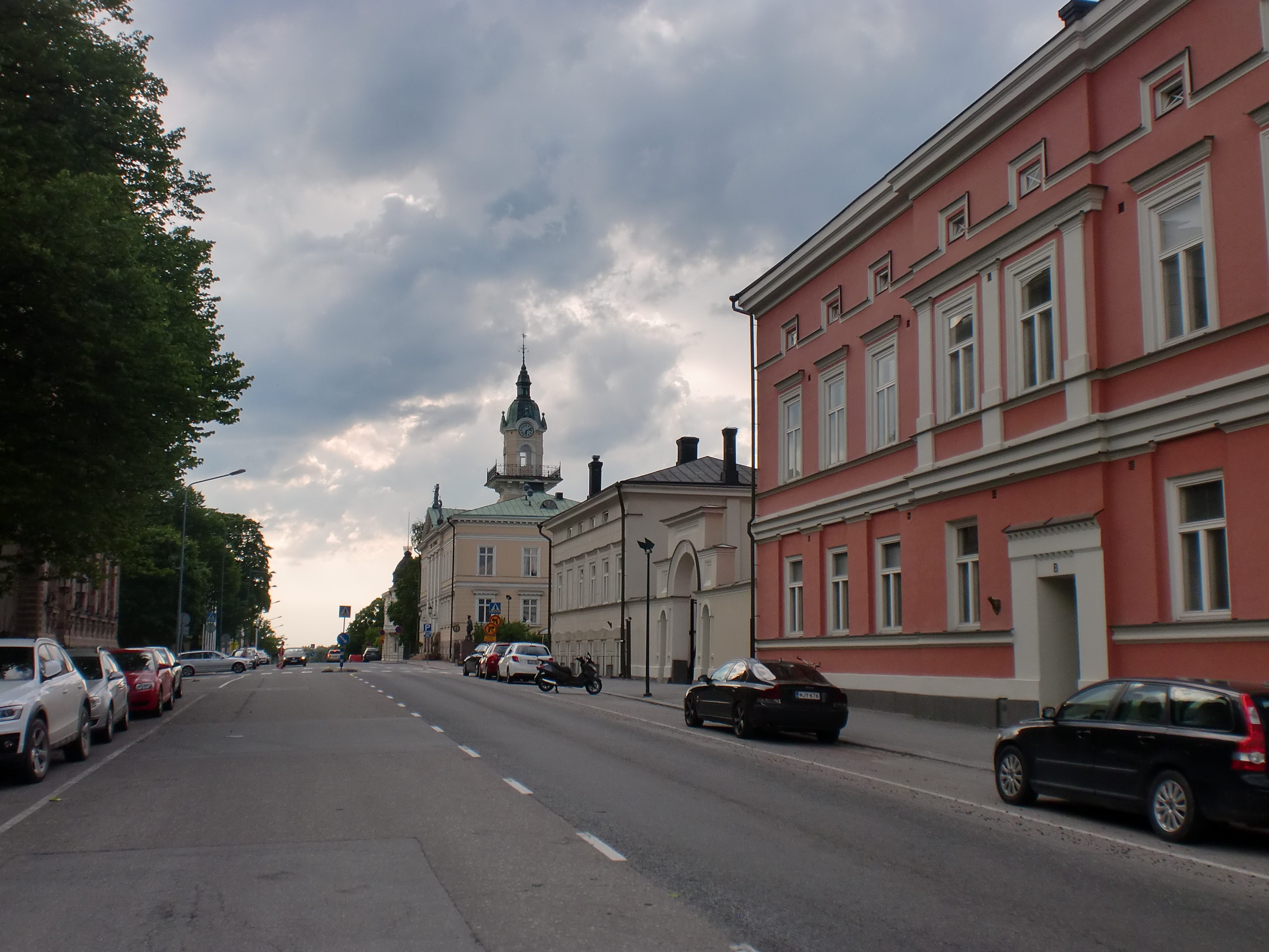 Hallituskatu; katu Porissa